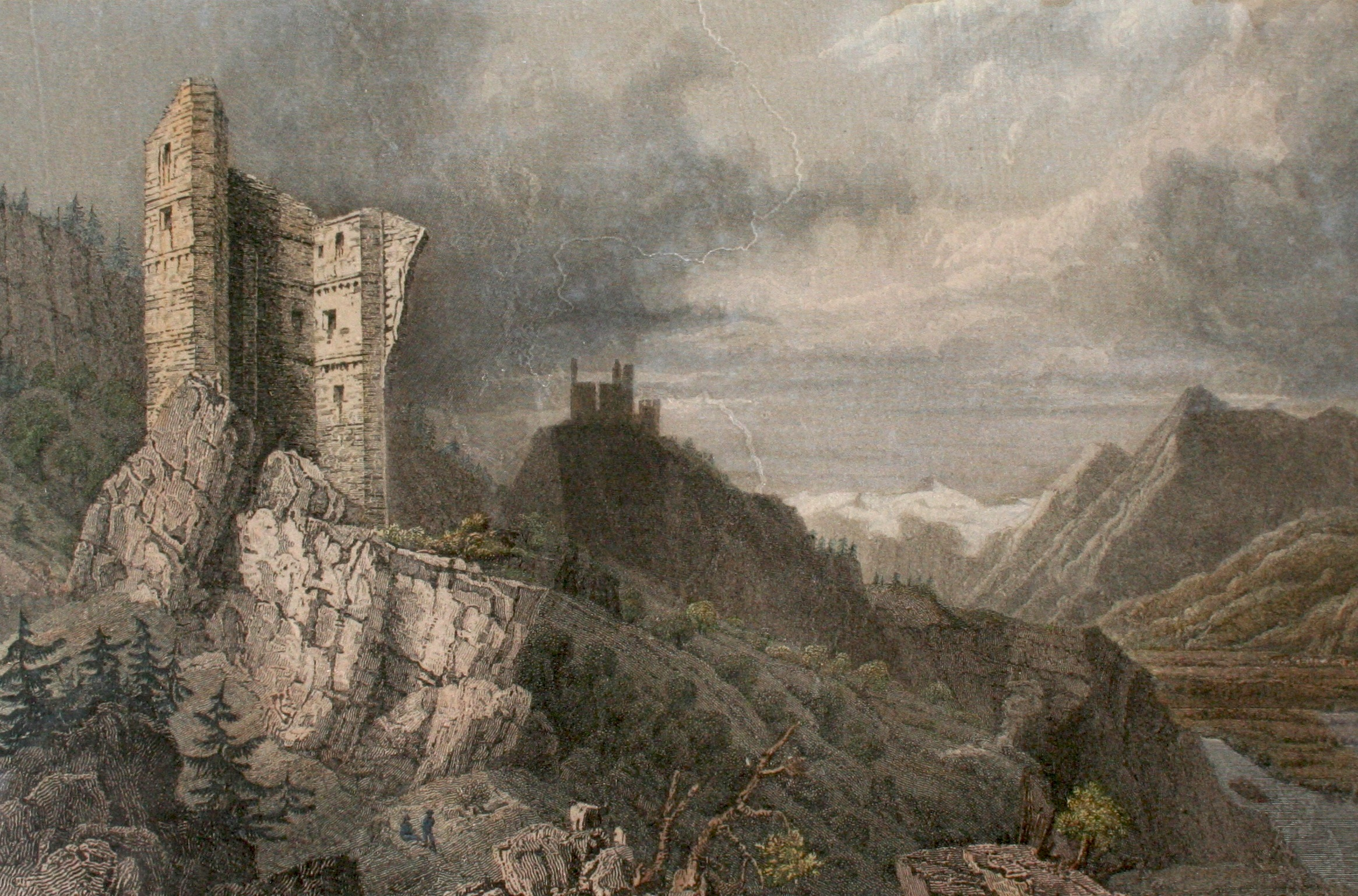 Haldenstein und Lichtenstein um 1830; Stich von William Tombleson